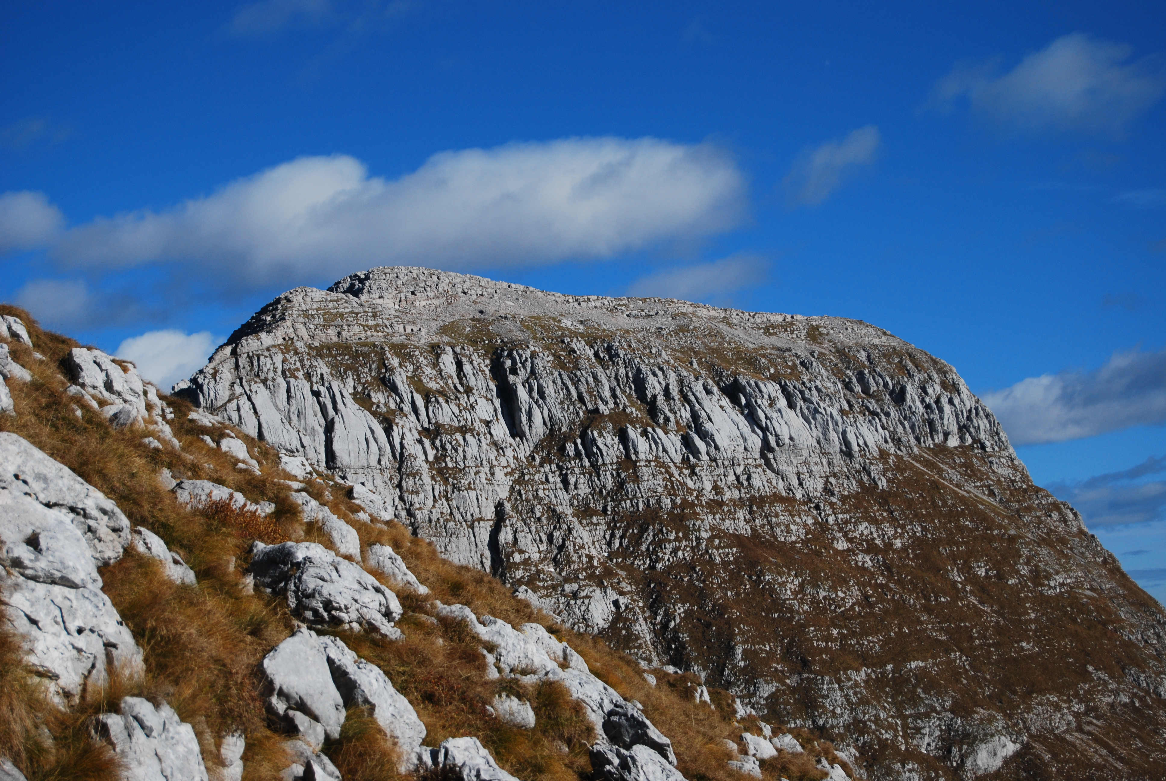 Pogled na Batognico iz pobočja pod Krnom.